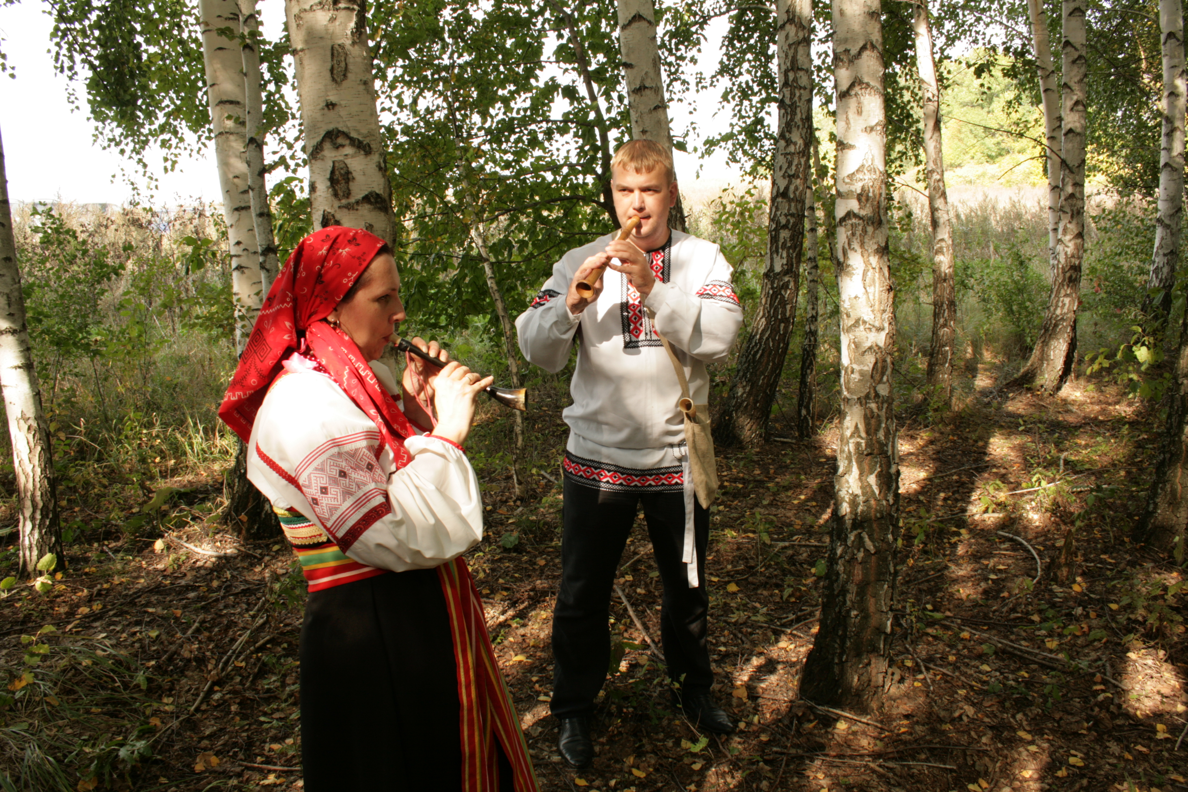 Открытие нового микрорайона родового экокопоселения «Кореньские родники». 15 сентября 2012 г. Белгородская область, Шебекинский район.